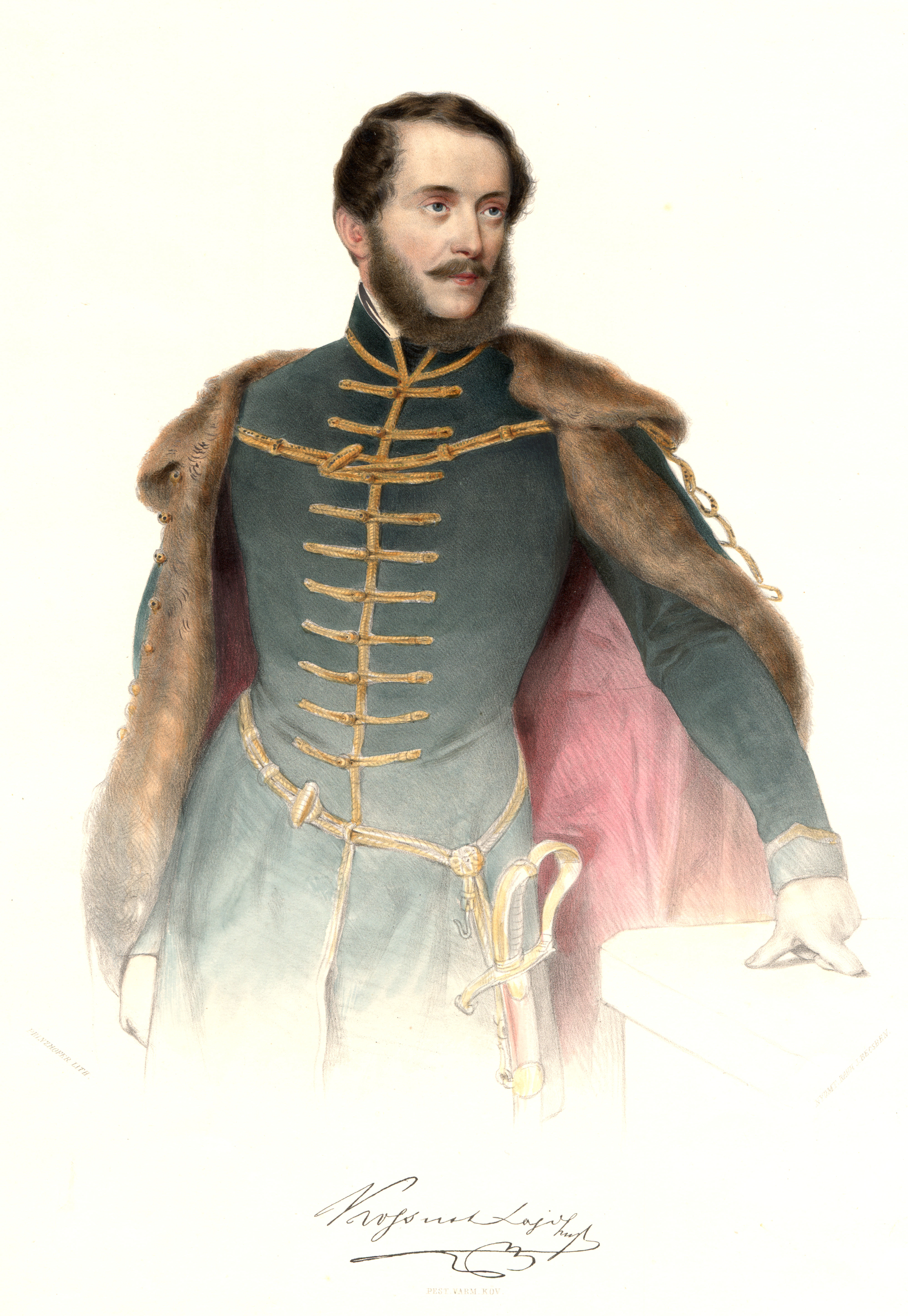 Kossuth Lajos portré, színezett litográfia